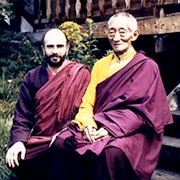 Kalour Rimpoche & Lama Denys Rimpoché à l'Institut Karma Ling